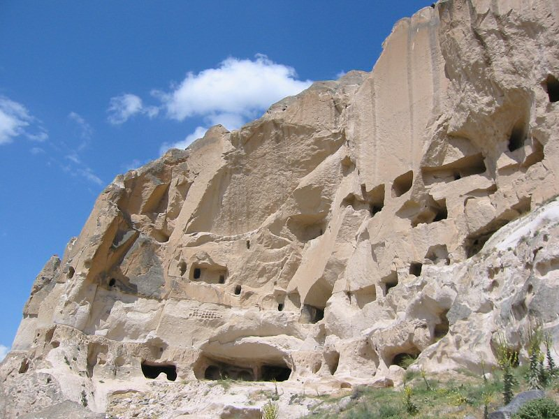 Tatlarin (Nevşehir), 2005, Turkey.